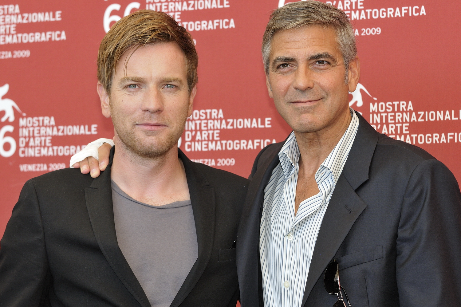 66ème Festival du Cinéma de Venise (Mostra), 6ème jour (07/09/2009) Photocall avec George Clooney et Elisabetta Canalis, Ewan McGregor et le réalisateur Grant Heslov pour le film : The men who stare at goats